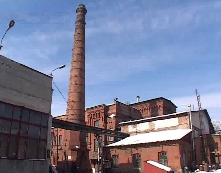 Kurgan.Pro